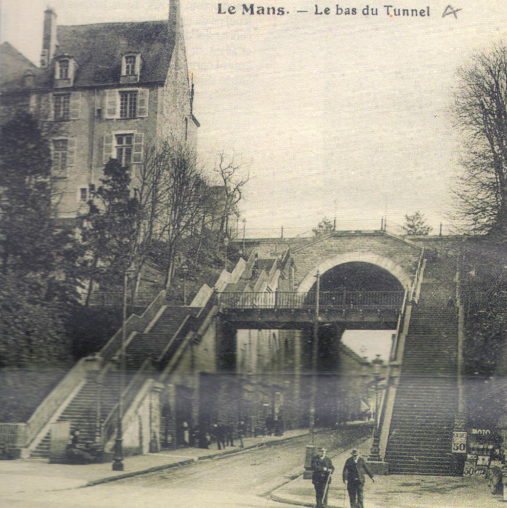 Information Le tunnel Source: Le Mans Metropole Magazine Date: 1880-1890 Author Municipalité du Mans-Imprimerie du Maine Permission: PD Old Archives de la MÃ©diathÃ¨que Louis Aragon